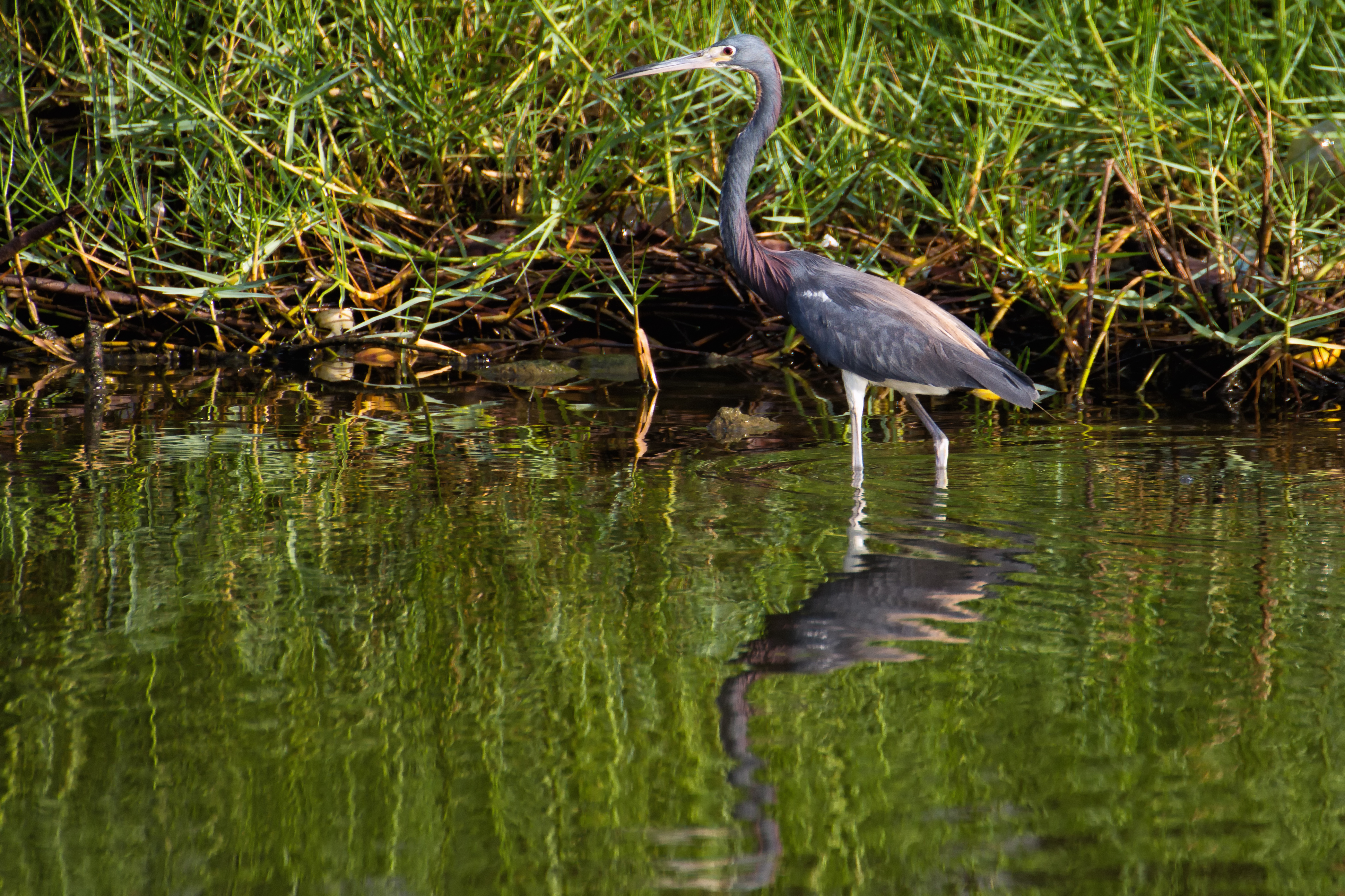 Tricolored Heron | Garza Pechiblanca (Egretta tricolor ruficollis)